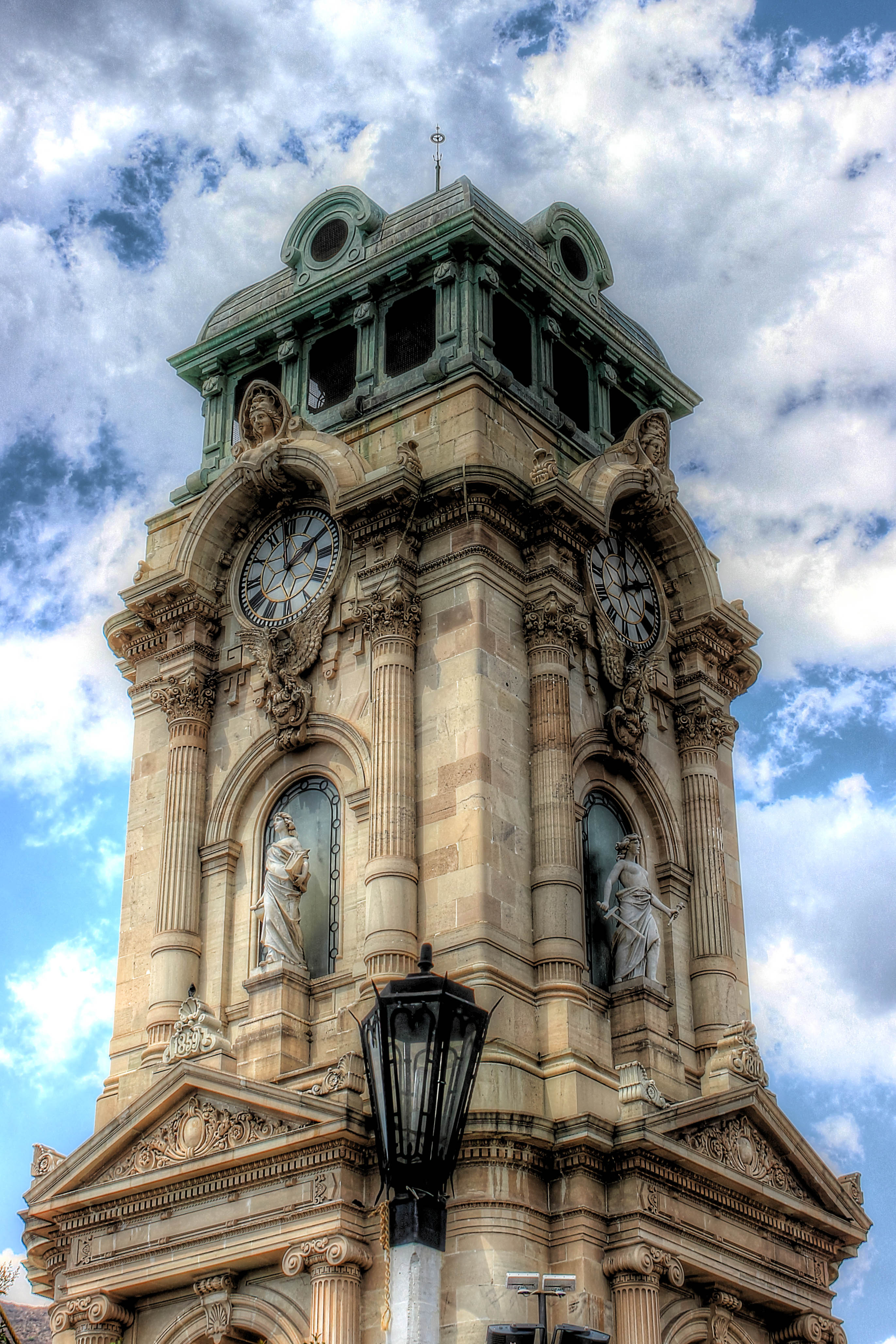 Pachuca de Soto